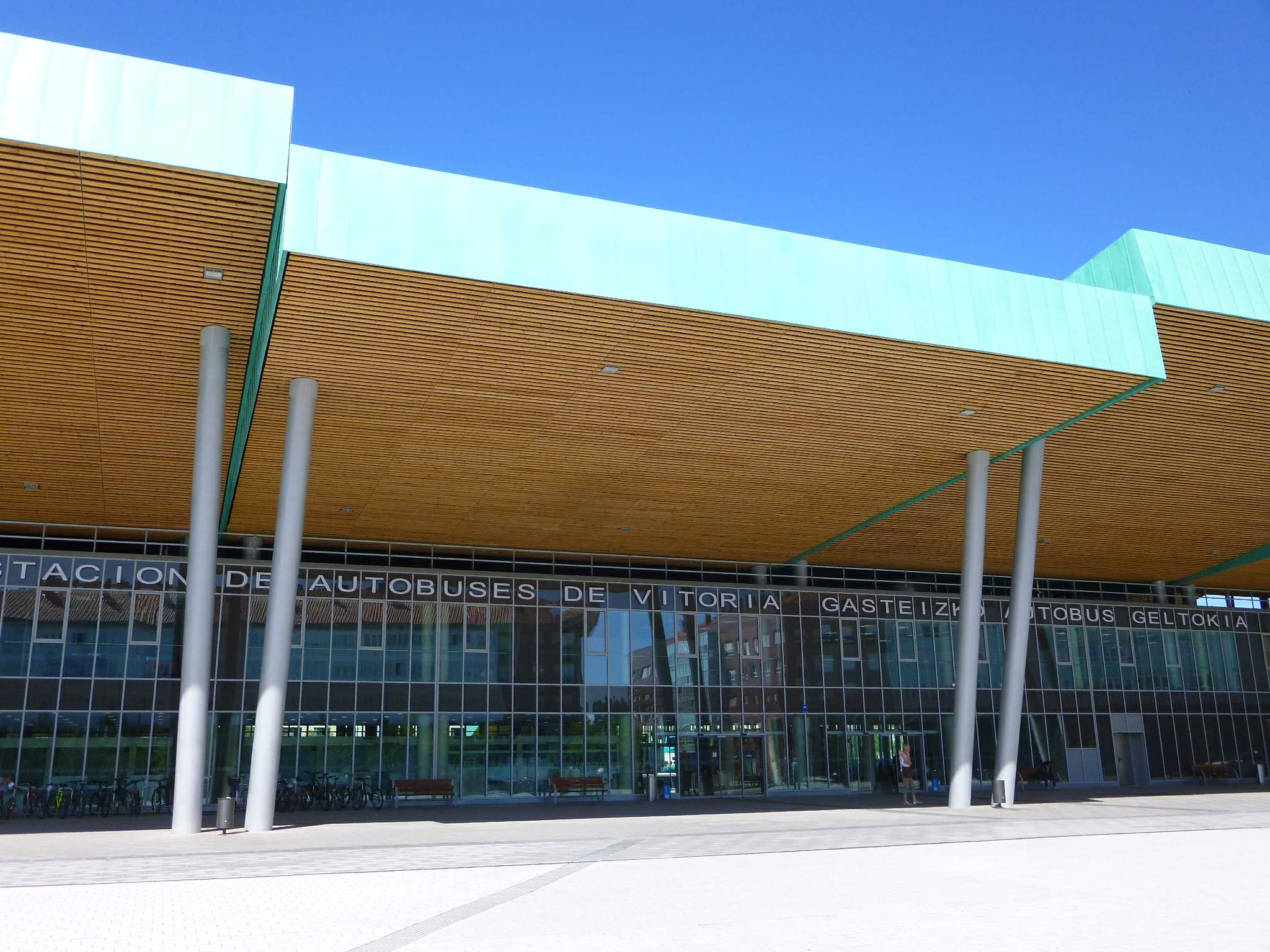 Estación de Autobuses de Vitoria